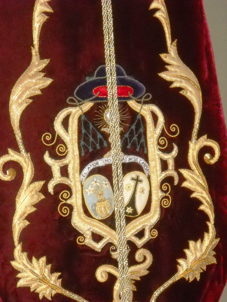 Este es el escudo de la hermandad de Palmete